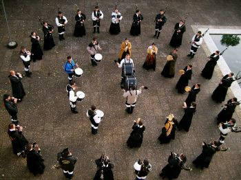 Banda de Gaitas en ensayo 2002, formato reducido